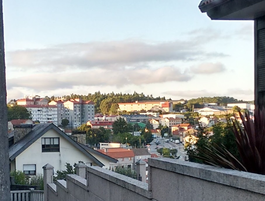 Foto de Puxeiros (Mos)